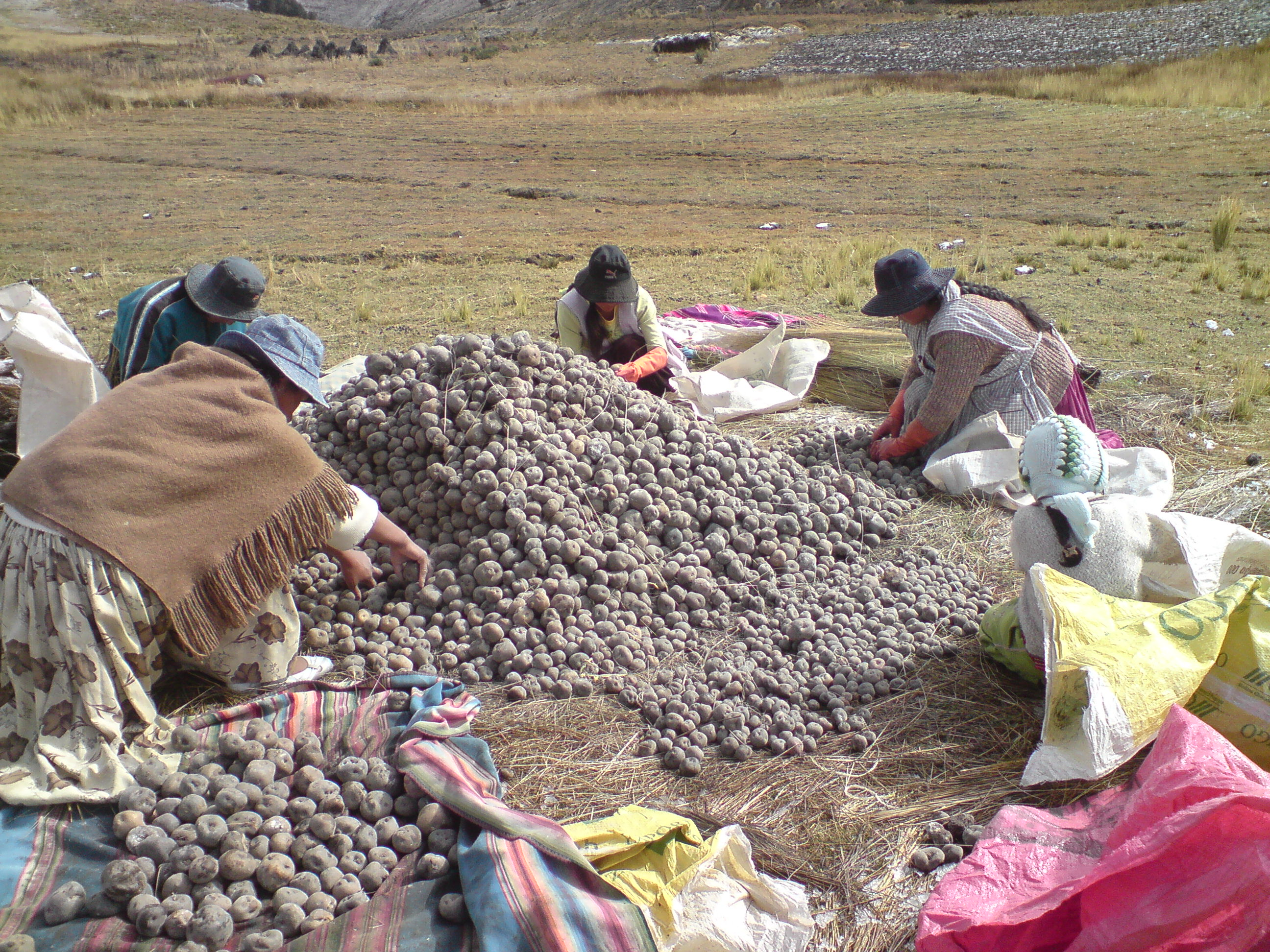 Selección de papa en HUACUYO provincia Manco kapac.